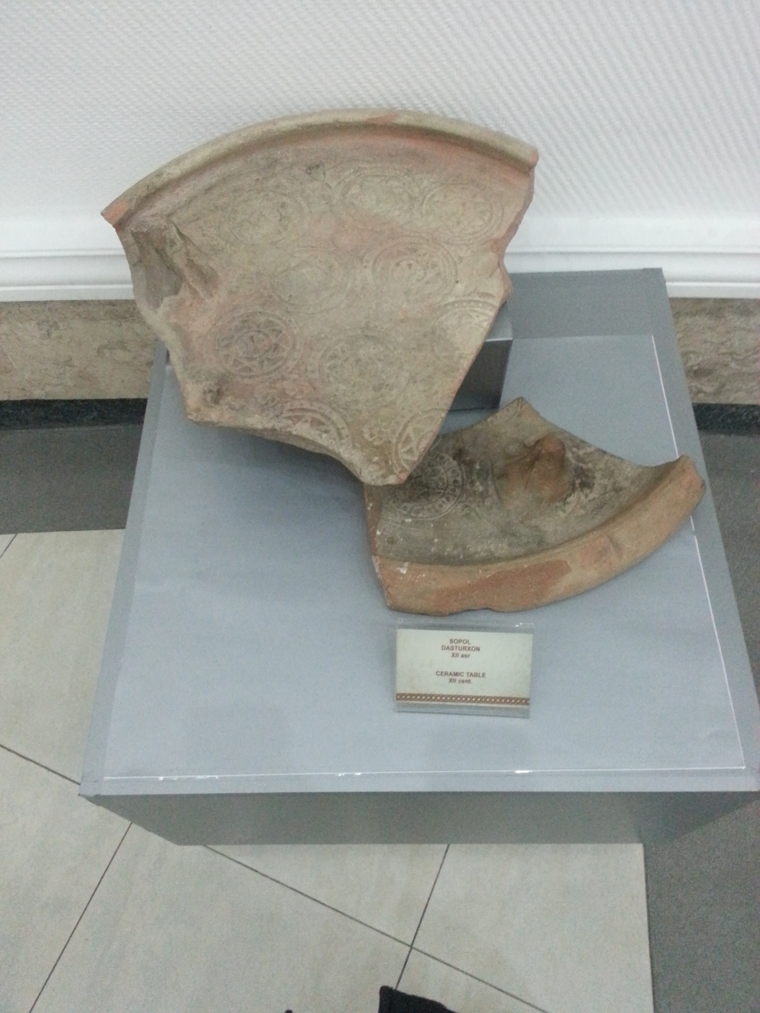 Глиняная посуда XIIвек. Музей Исторри Тимуридов. Ташкент